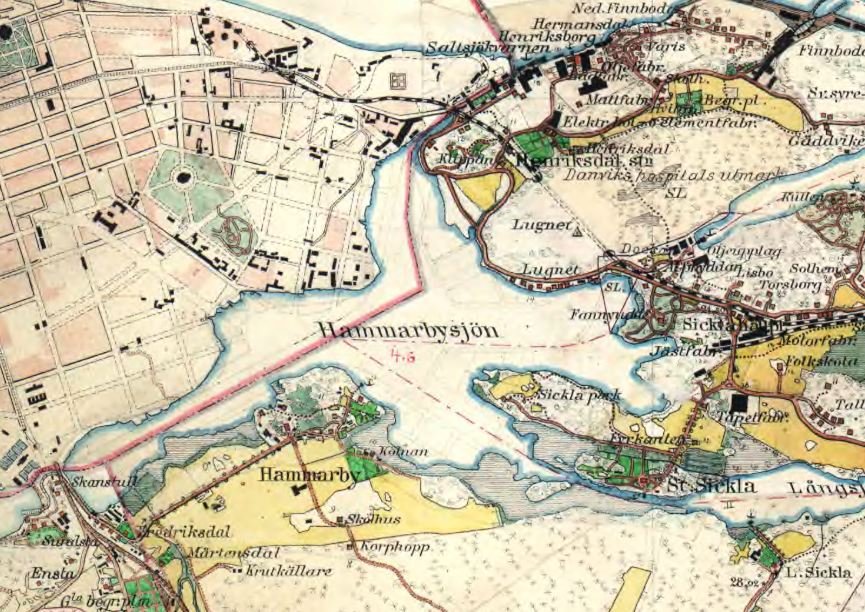 Hammarbysjön på häradsekonomiska kartan 1901-06